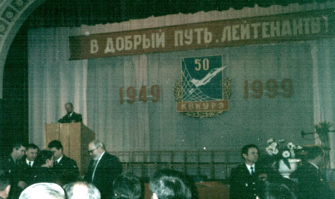 Крайний выпуск Красноярского ВКУРЭ ПВО